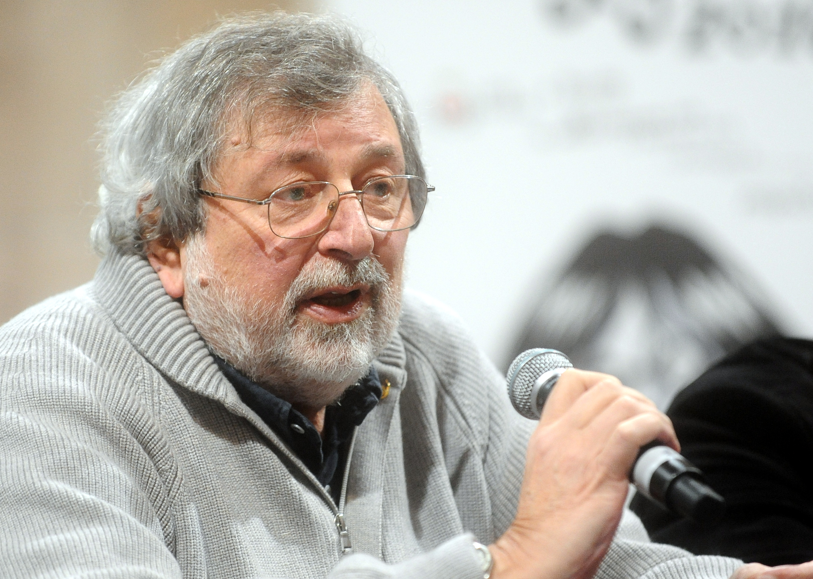 Francesco Guccini a Lucca Comics & Games 2016. Chiesa di San Giovanni.